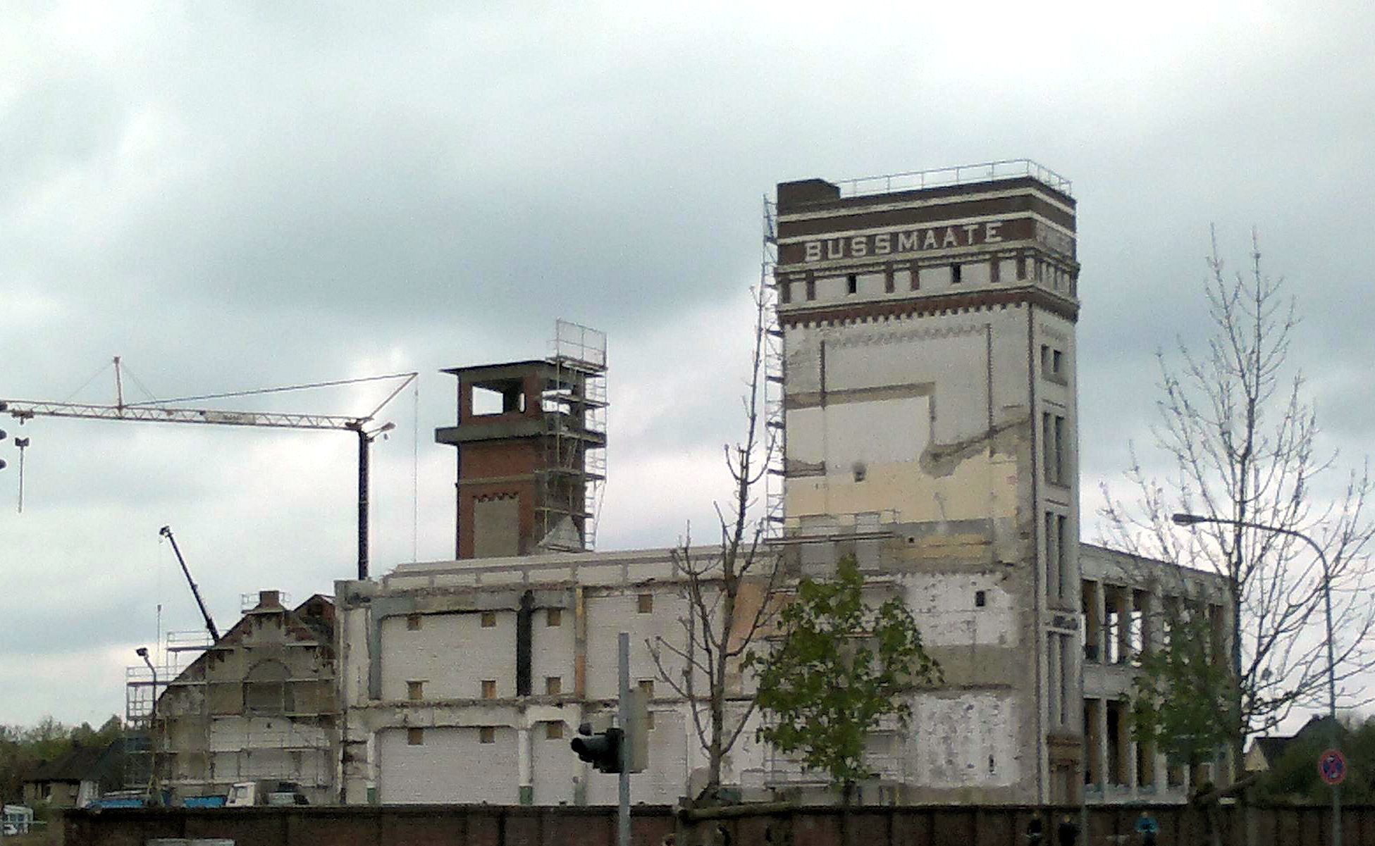 Ruine der Textilfabrik Rawe am Stadtring Nordhorn, 2010 Beginn der Umbauarbeiten, Baugebiet "Rawe-West"